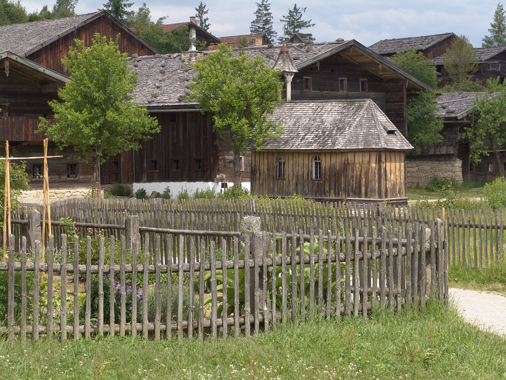 Museumsdorf Bayerischer Wald bei Tittling (2005) Fotograf: Walter J.Pilsak, Waldsassen Copyright Status: GNU Freie Dokumentationslizenz